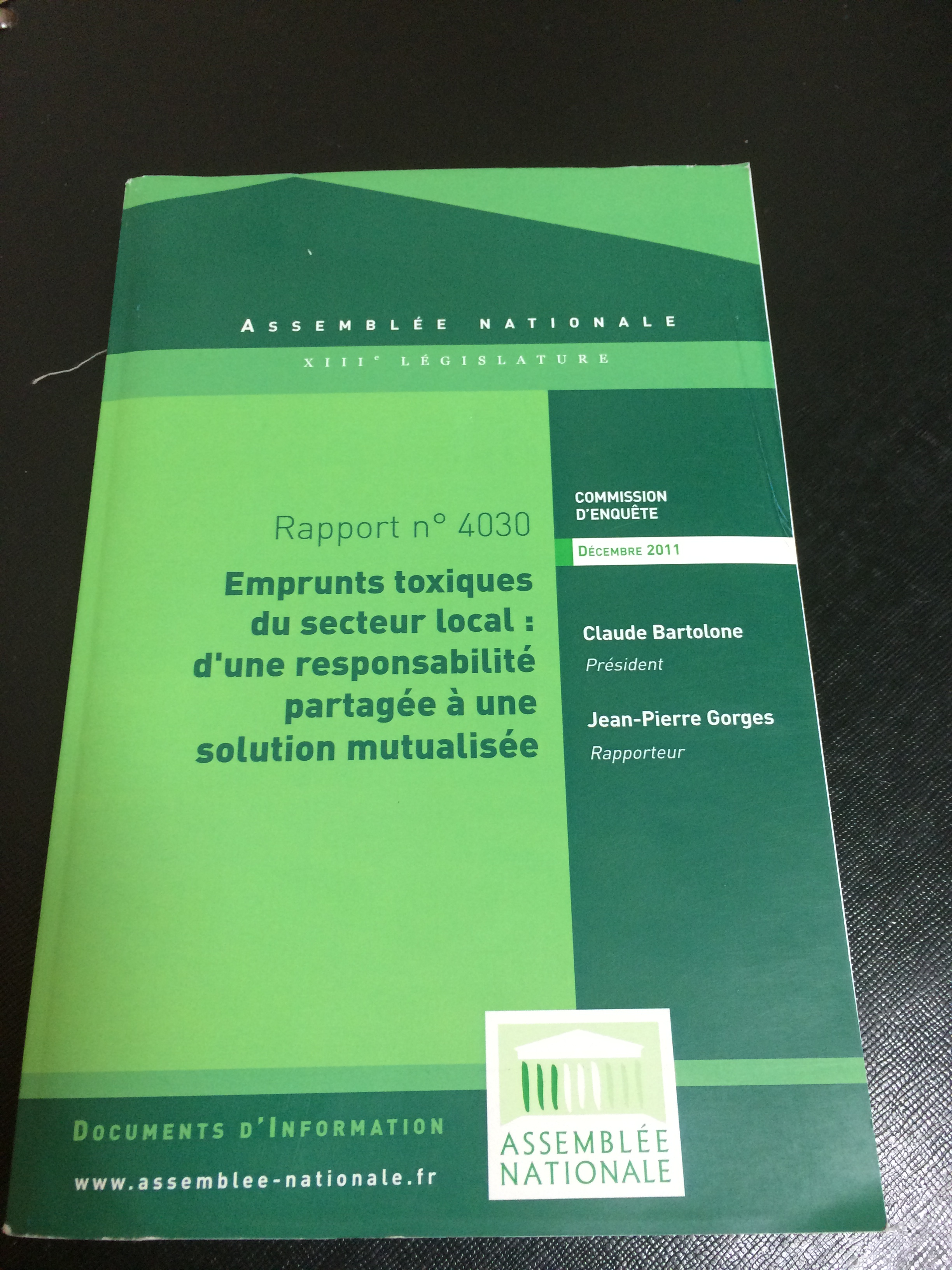 Rapport n°4030 de la commission d'enquête parlementaire sur les emprunts toxiques présidée par Claude Bartolone. rapporteur Jean-Pierre Gorges. Décembre 2011.